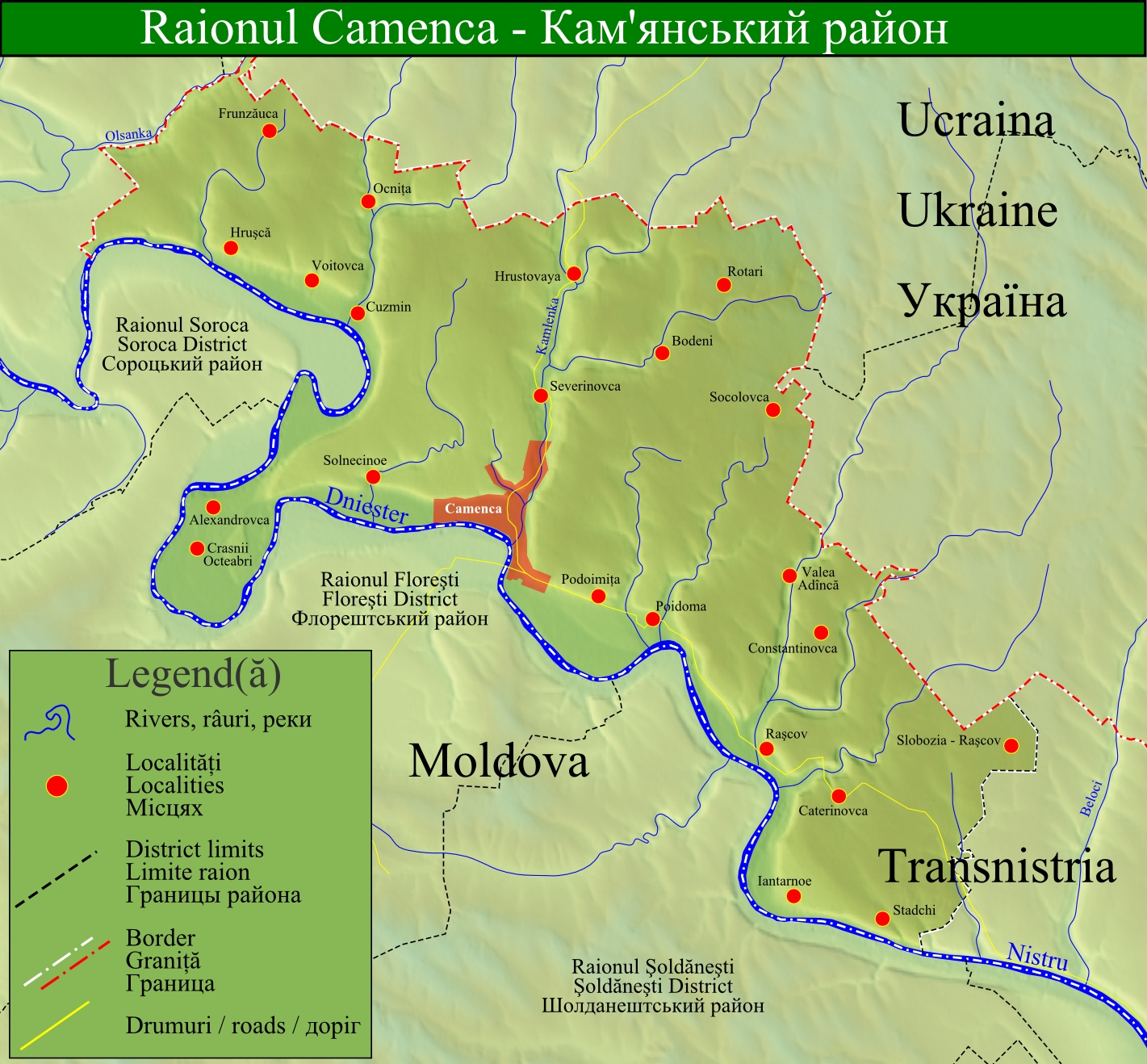 Raionul Camenca, Transnistria.